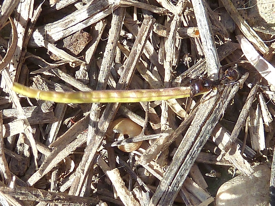 Messor barbarus llevándose una silicua de Moricandia arvensis - Avda de la Libertad, Albatera (Alicante, España).